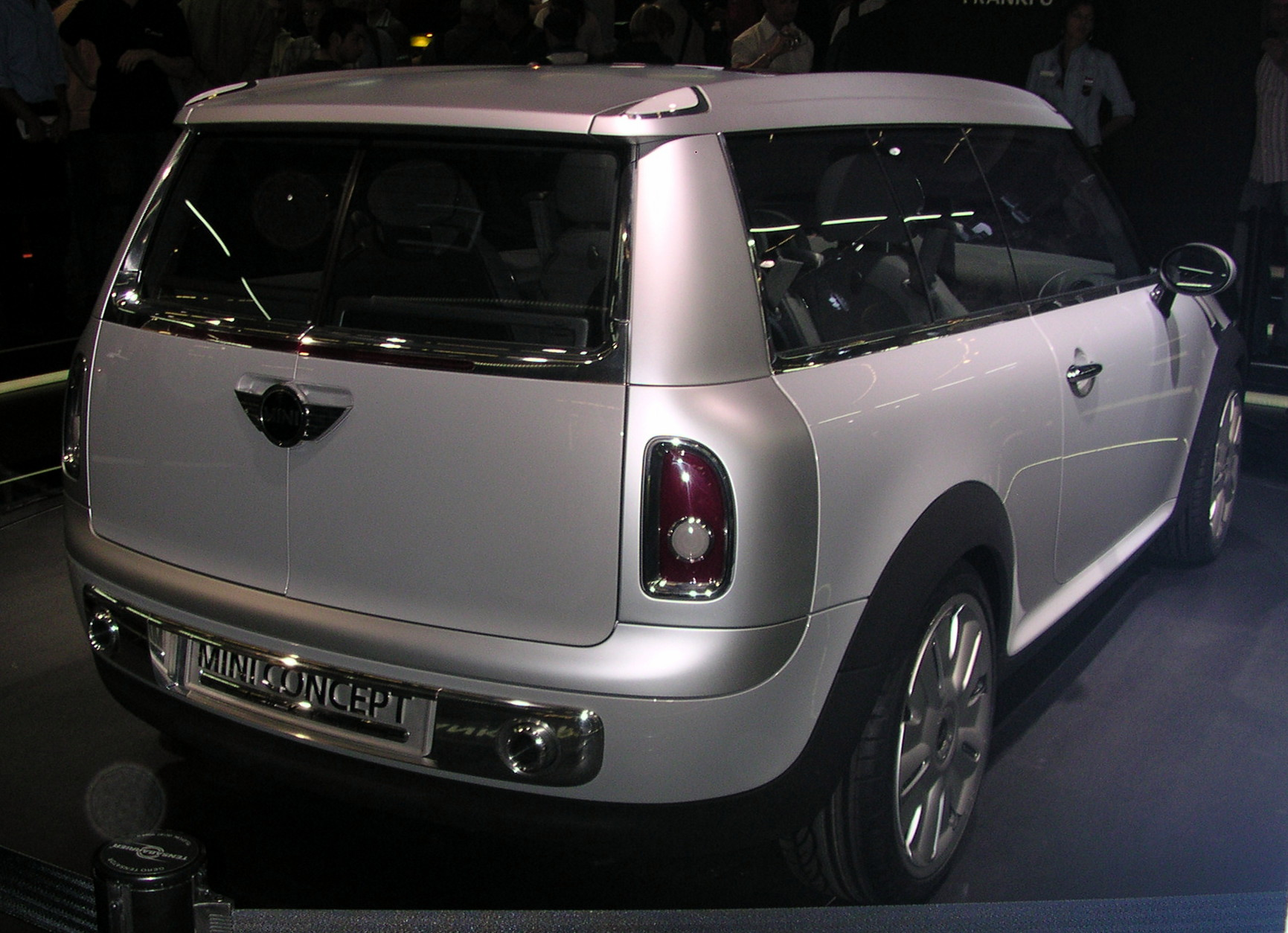 Studie für einen Mini-Kombi bei der PKW-IAA 2005 in Frankfurt